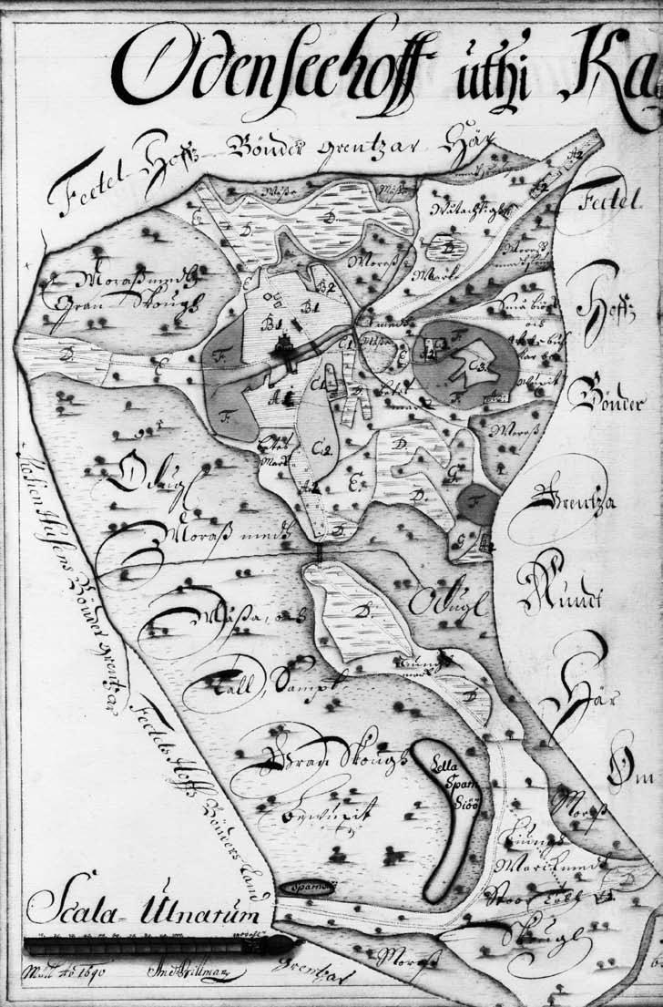 Odzienas muižas plāna fragments. 1690. gads. (Sast. A.Bilmans. LVVA, 7404. f.,1. apr., 1666. l.)